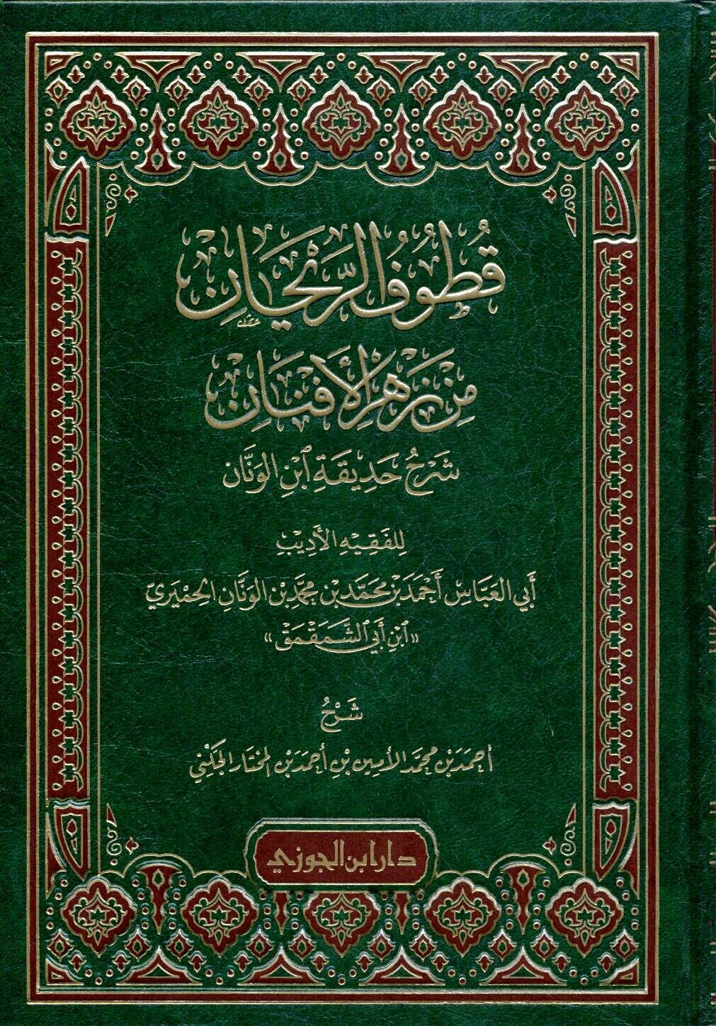 غلاف كتاب "قطوف المرجان" وهو اختصار الشنقيطي لشرح الناصري المعروف ب "زهر الأفنان من حديقة ابن الونان"